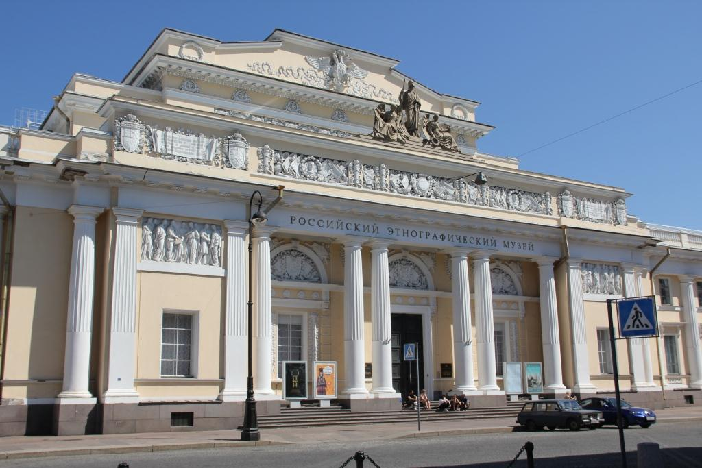 Фото Российского этнографического музея (Санкт-Петербург)